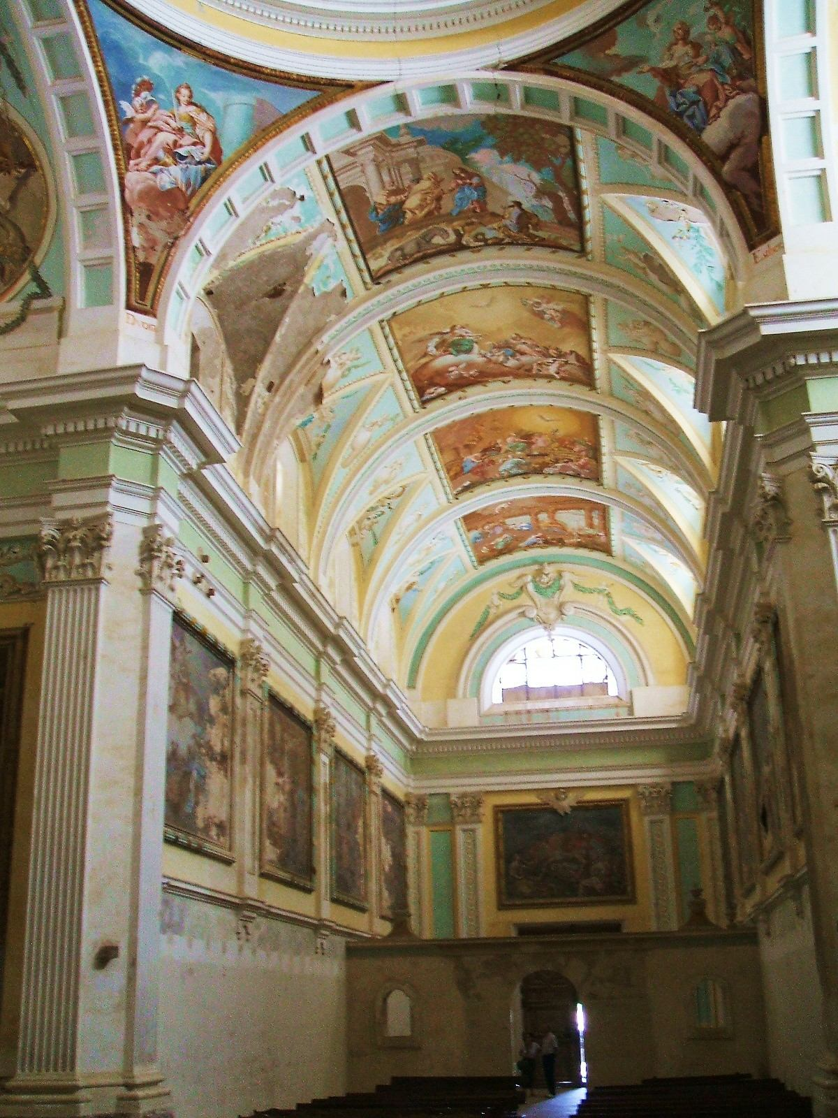 Iglesia de la Cartuja de Nuestra Señora de las Fuentes (Cartuja de Monegros), en el término municipal de Sariñena, Huesca, Aragón, España.